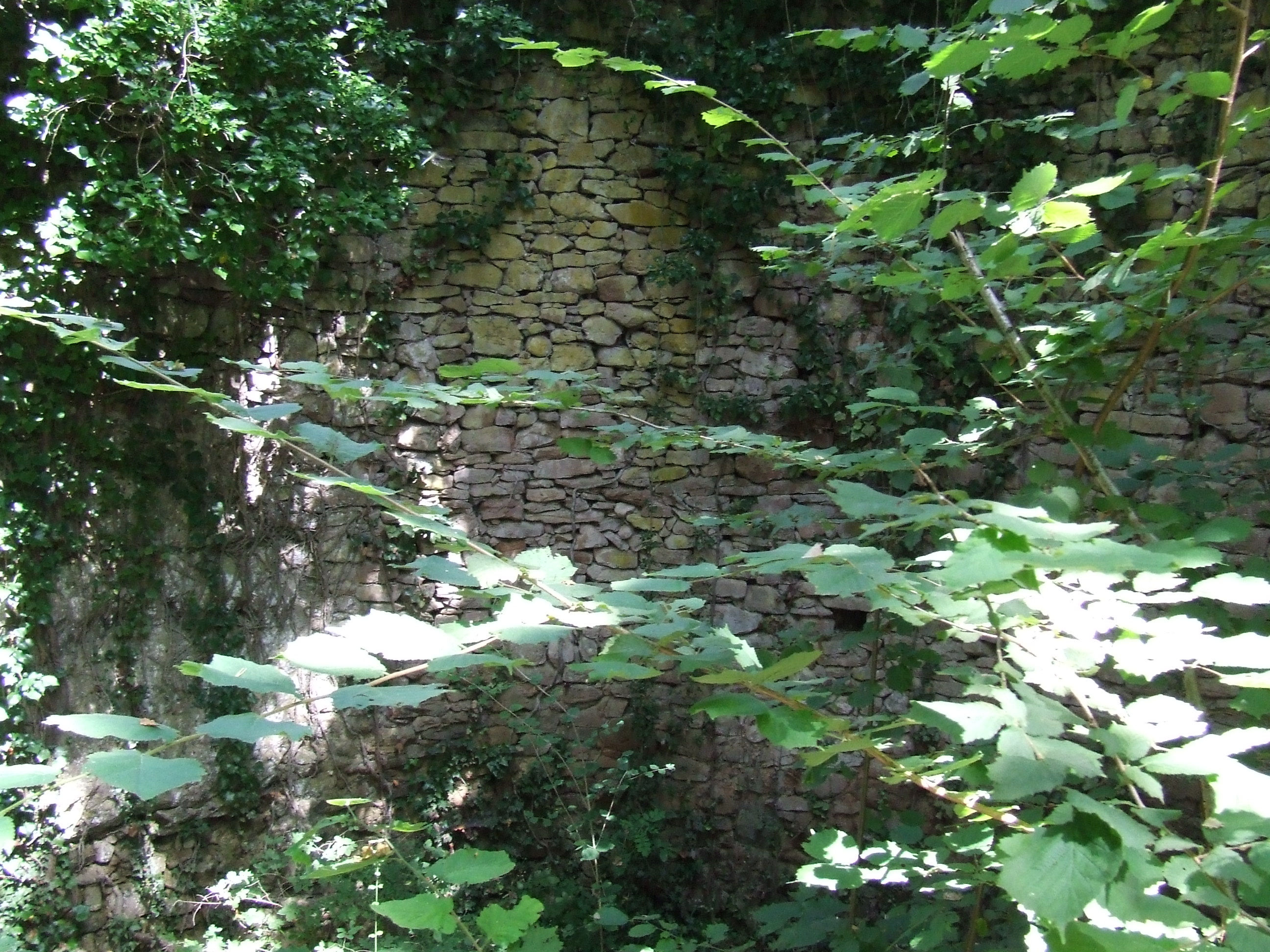 La Poua Vilardell (Castellcir, Moianès)